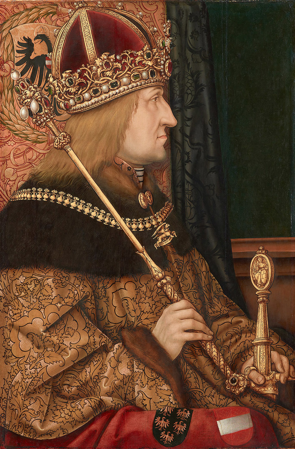 Kaiser Friedrich III. nach einem verlorenen Original von 1468